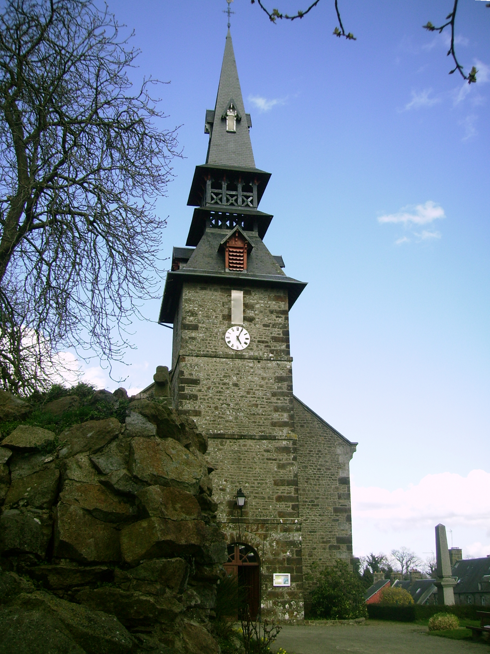 Eglise Landisacq